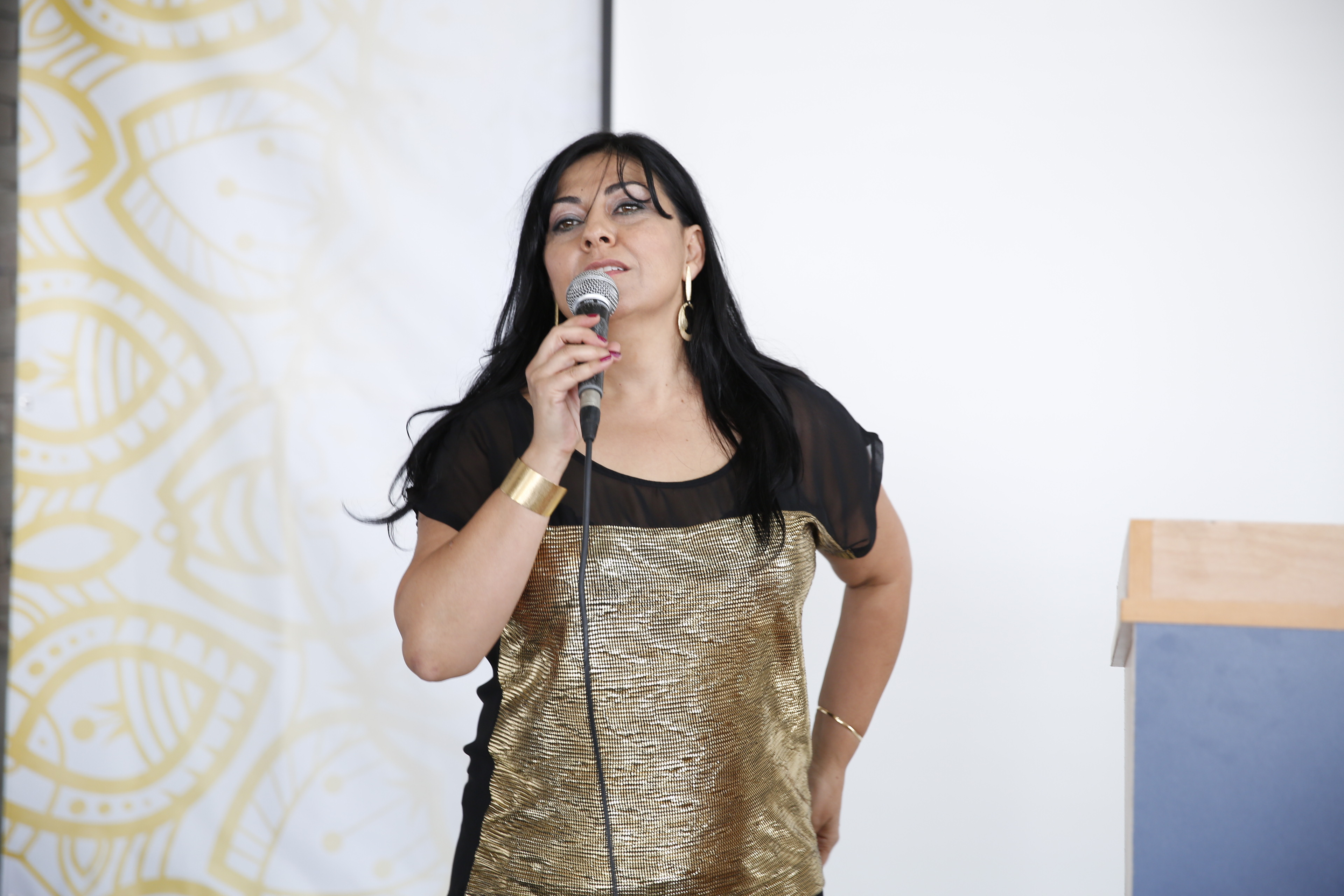 הזמרת אמל מורקוס בנצרת.